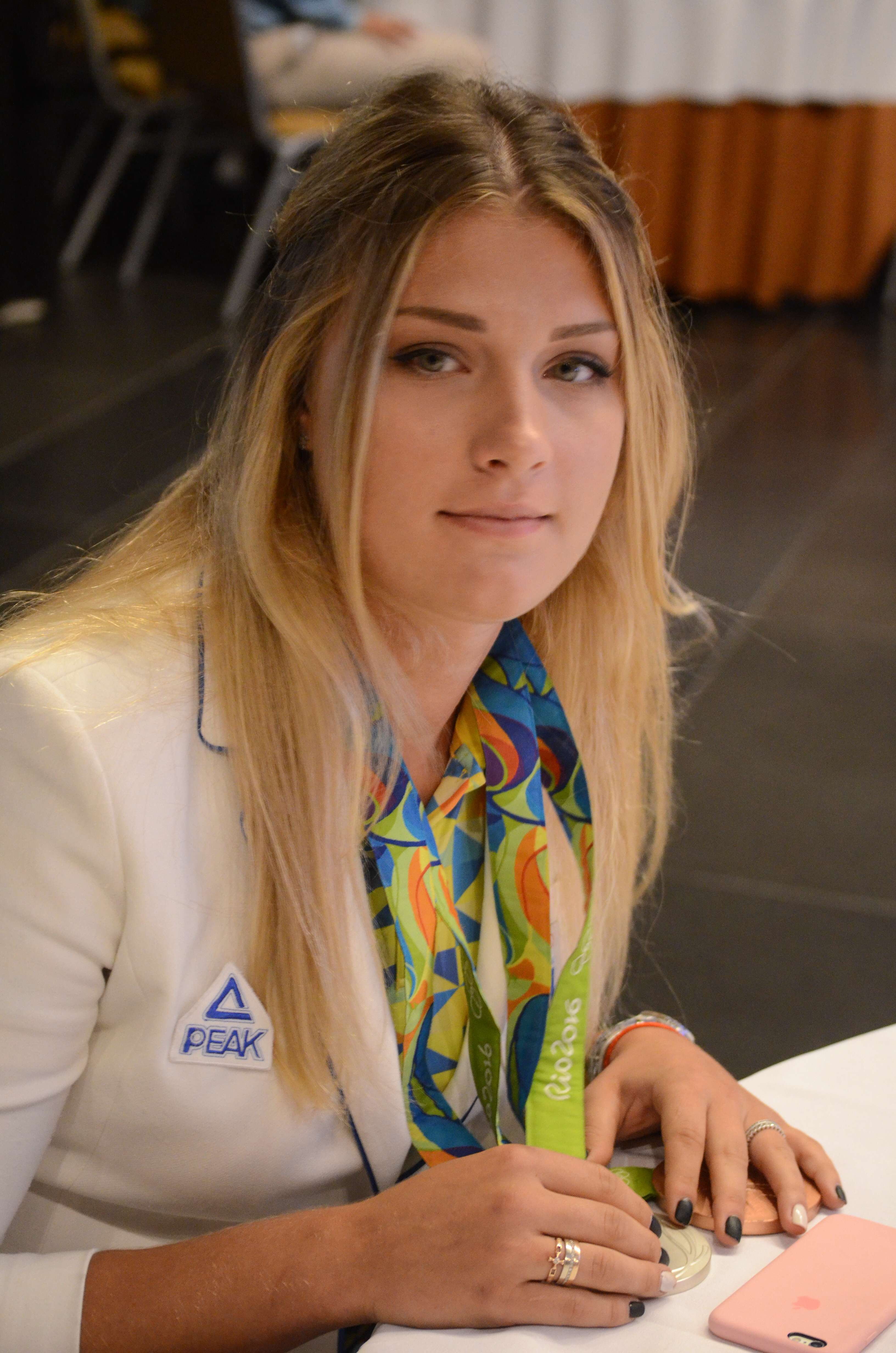 Зустріч Президента України з олімпійцями та паралімпійцями — учасниками Ріо-2016.